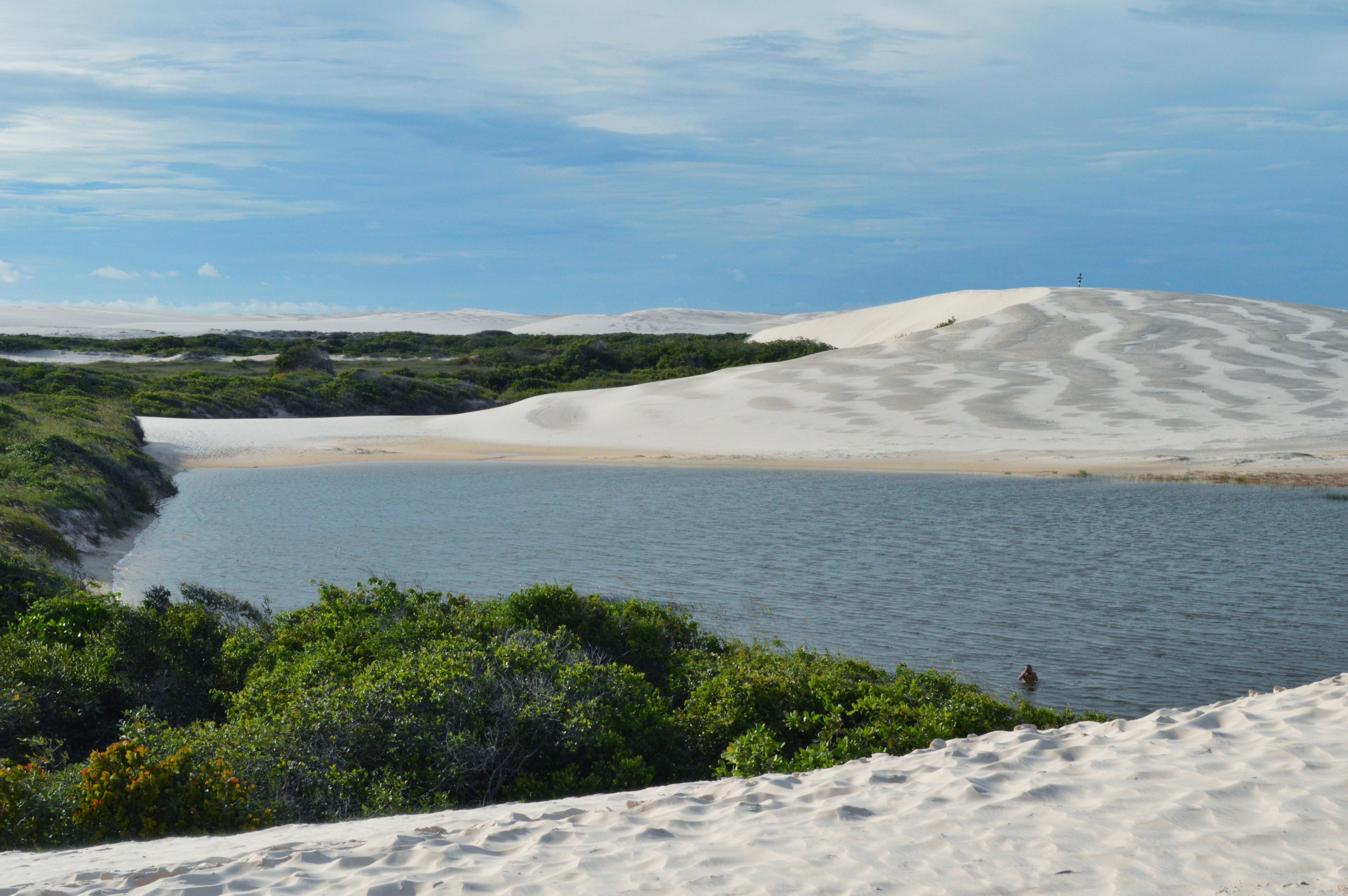 Lagoa dos Peixes - Parque Nacional dos Lençóis Maranhenses.